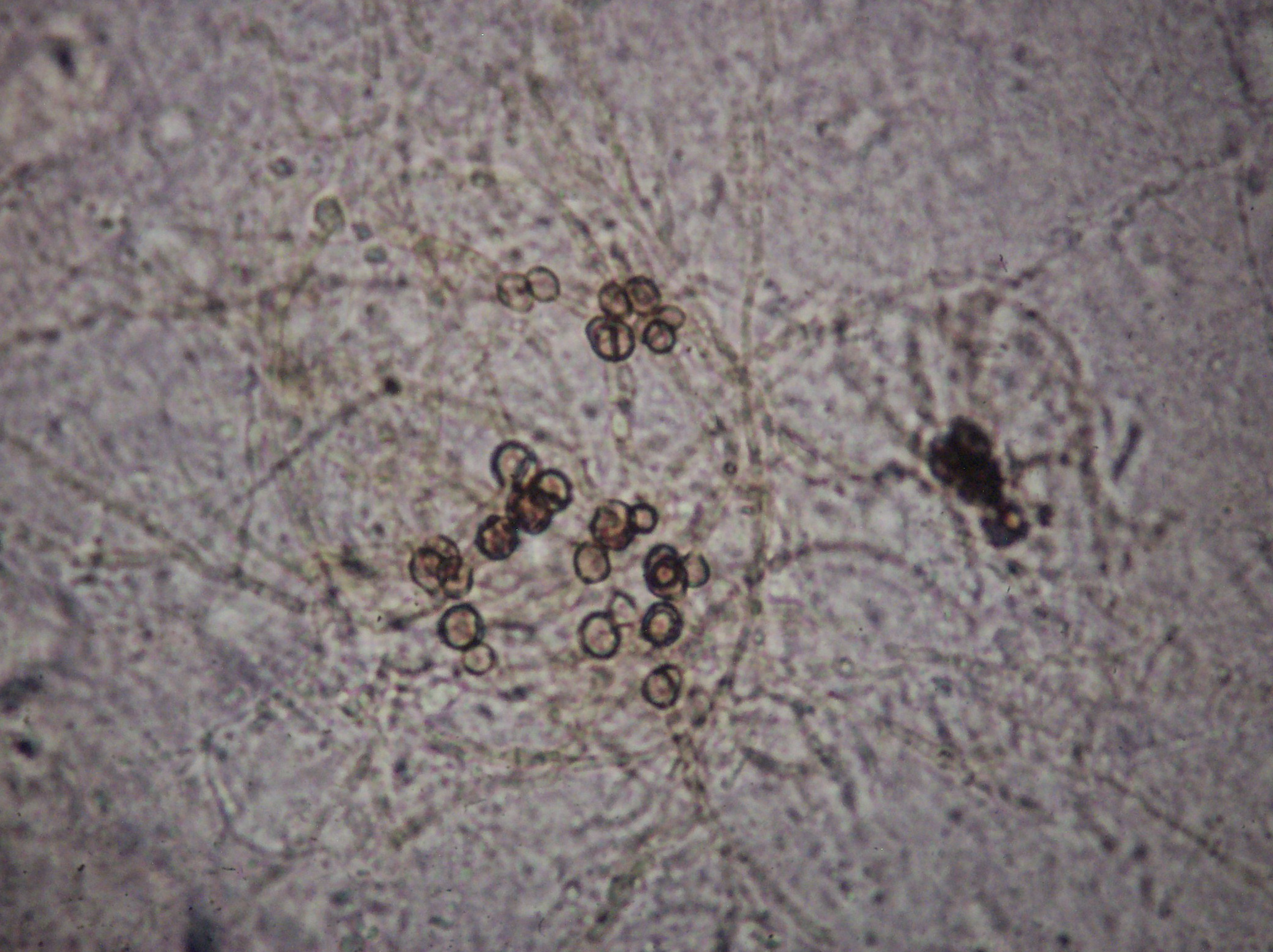 Cuerpo esclerótico del hongo Fonsecaea pedrosoi en tejido subcutáneo de un paciente con Cromomicosis.